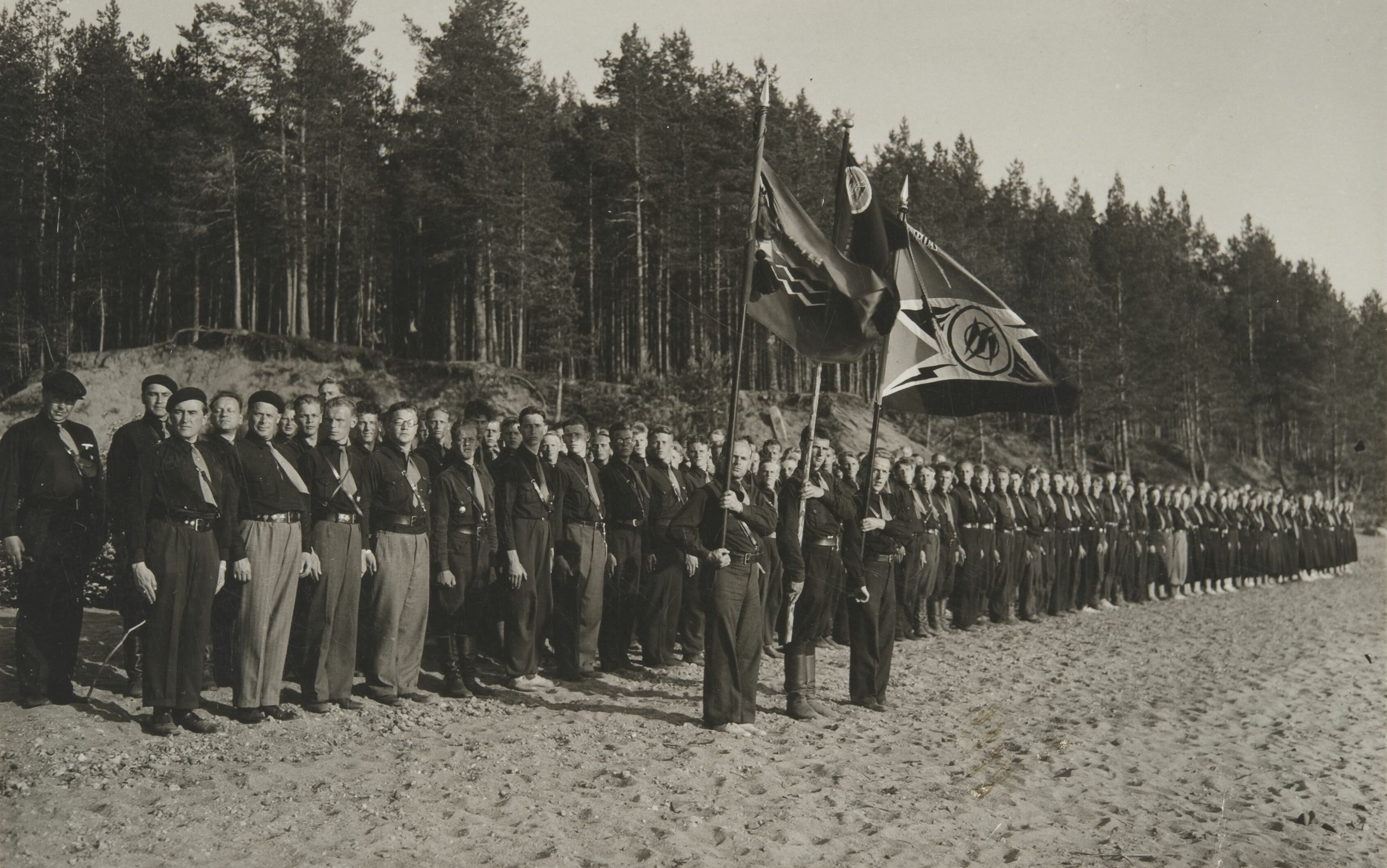 Sinimusta-järjestön katselmus Kuortaneella 1935